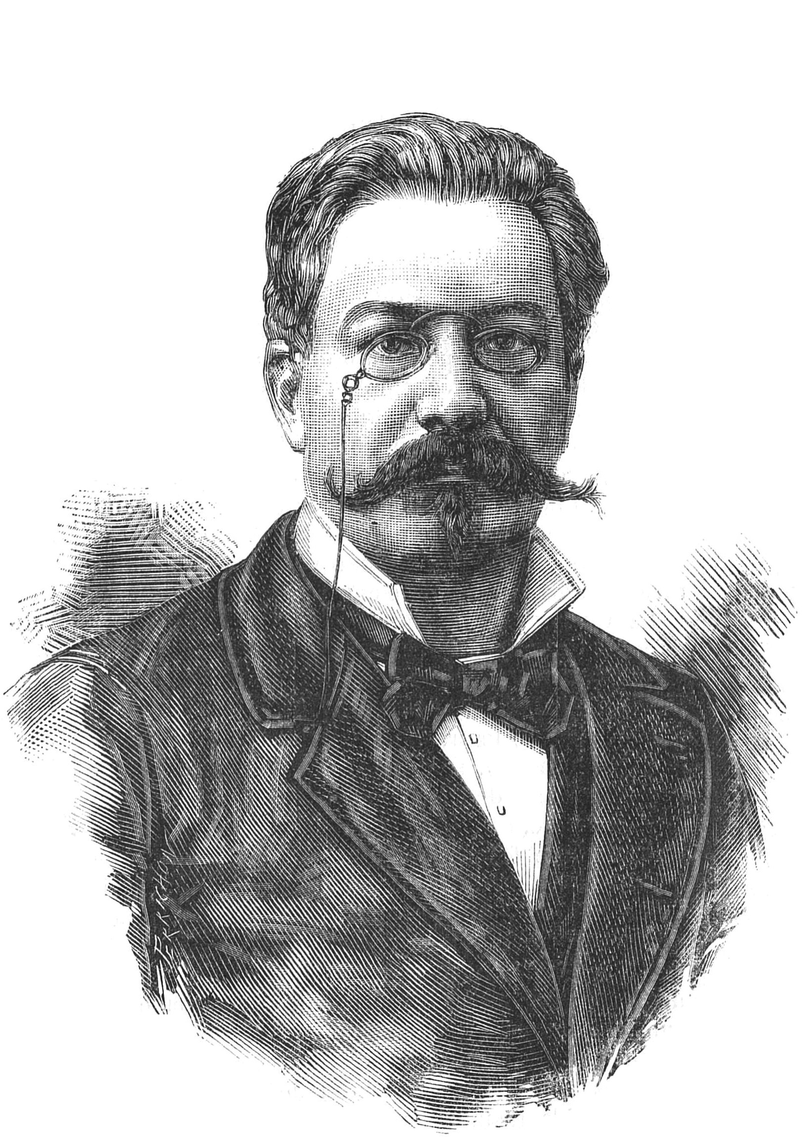 "M. Barbe, ministre de l'Agriculture".